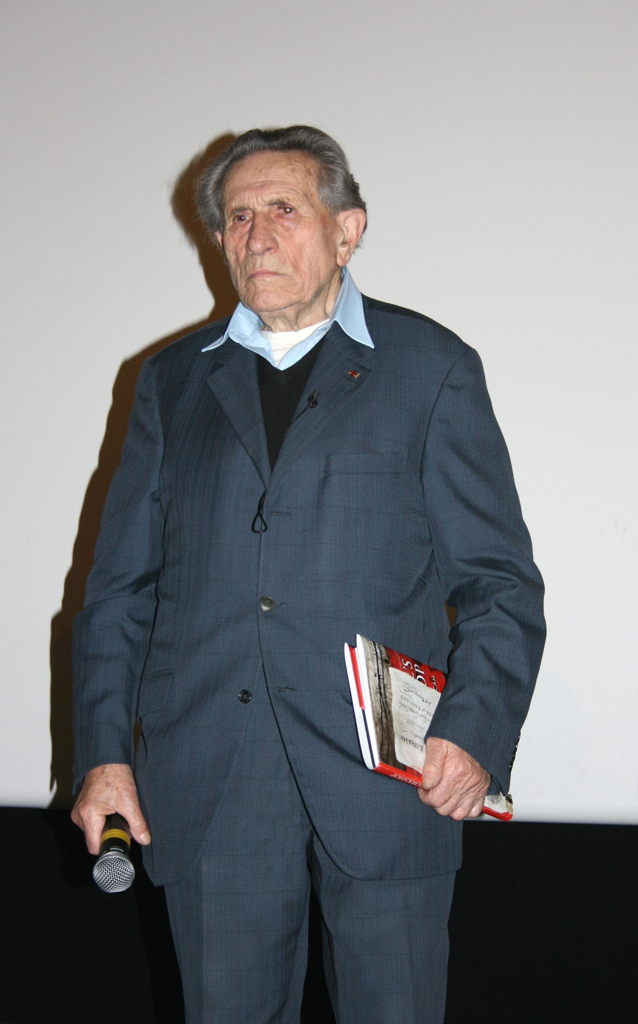 Adolf Burger à l'avant-première des Faussaires diffusée à l'UGC Ciné Cité Les Halles, à Paris.